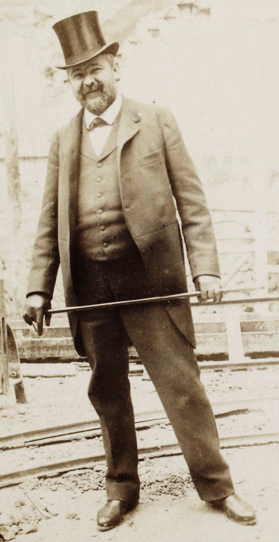 [Collection Jules Beau. Photographie sportive] : T. 8. Années 1898 et 1899 / Jules Beau : F. 16. Rives, architecte de l' Automobile Club